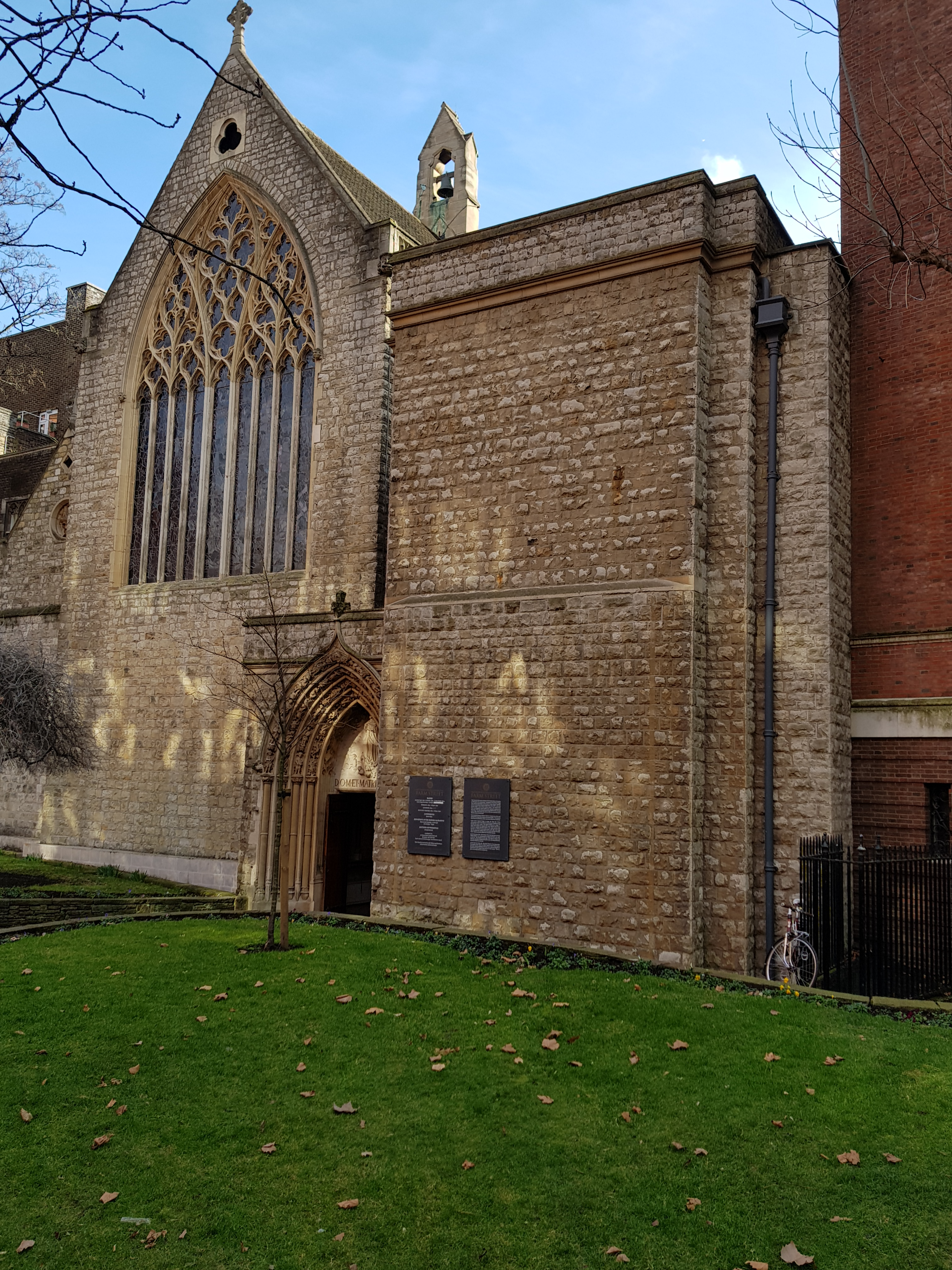 Eglise de l'Immaculée Conception, Mount Street Gardens, Londres.